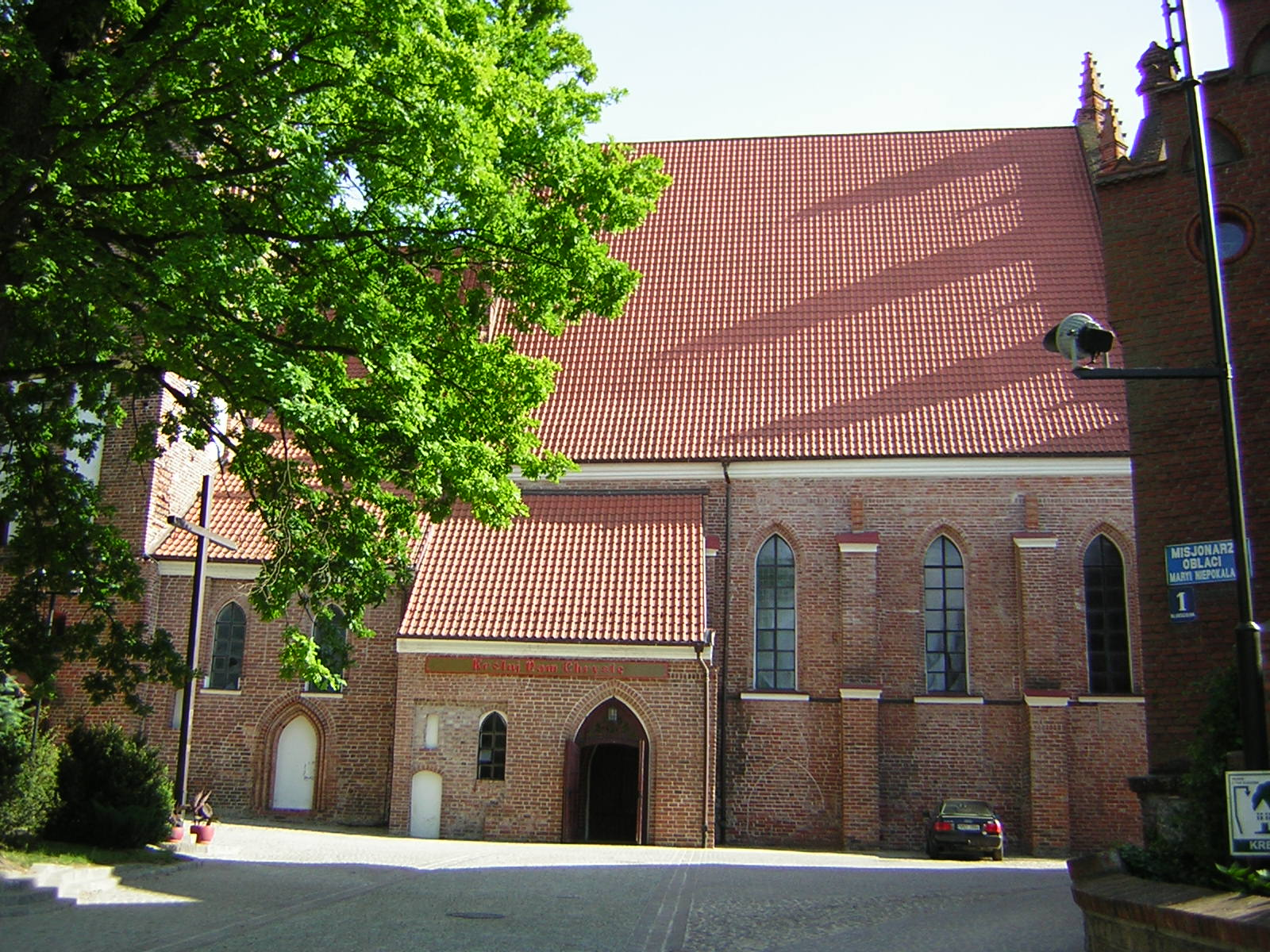 Kościół p.w. Przemienienia Pańskiego w Iławie